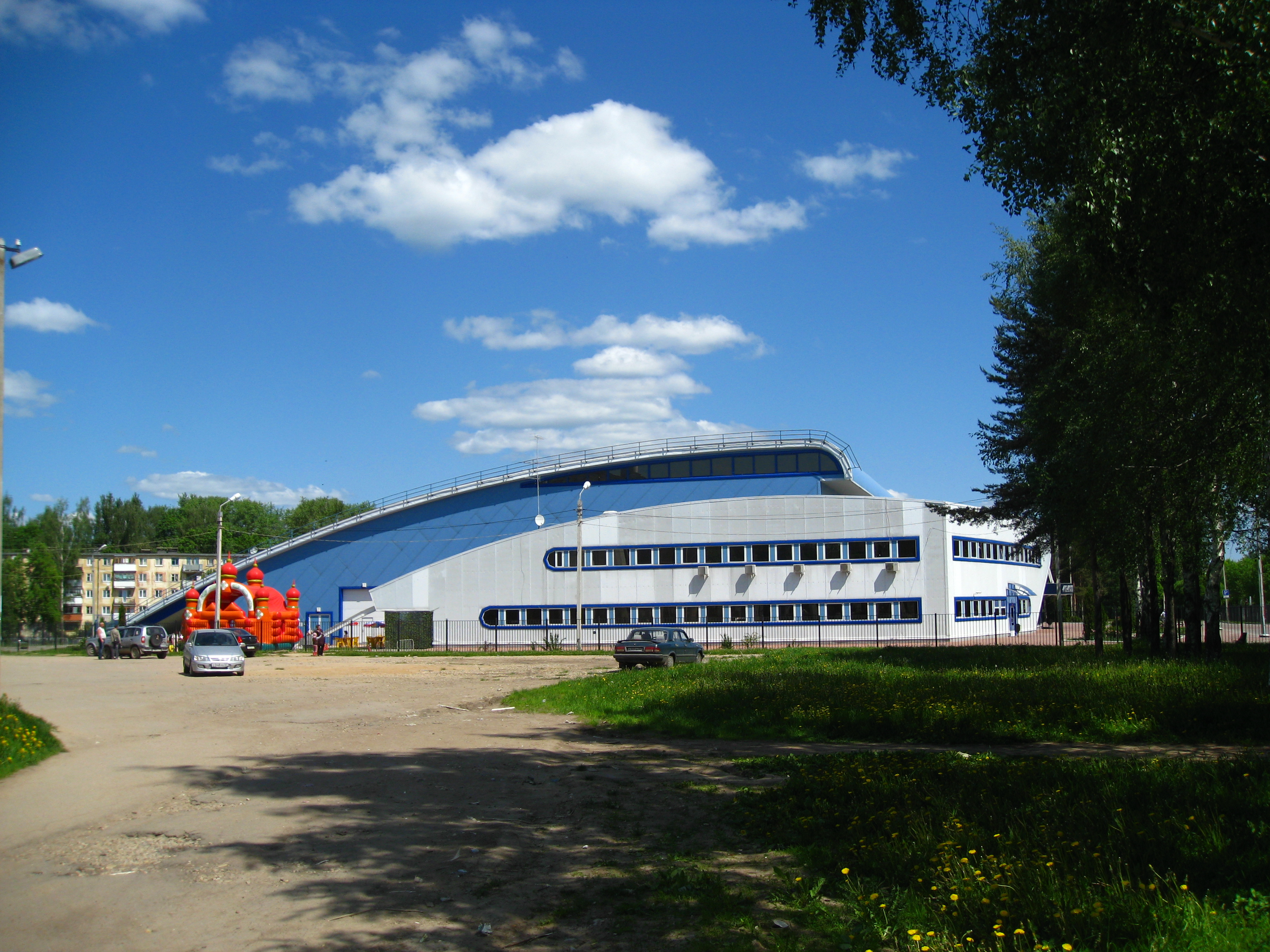 Ледовый дворец в Смоленске